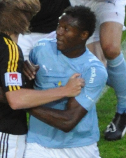 Edward Ofere